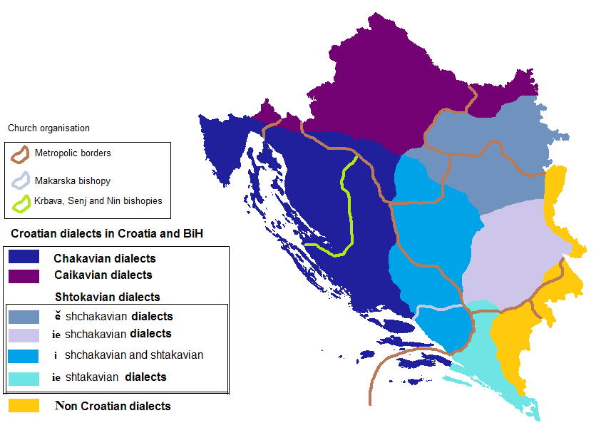 Hrvatski dijalekti u 14. stoljeću s ucrtanim granicama metropolija.